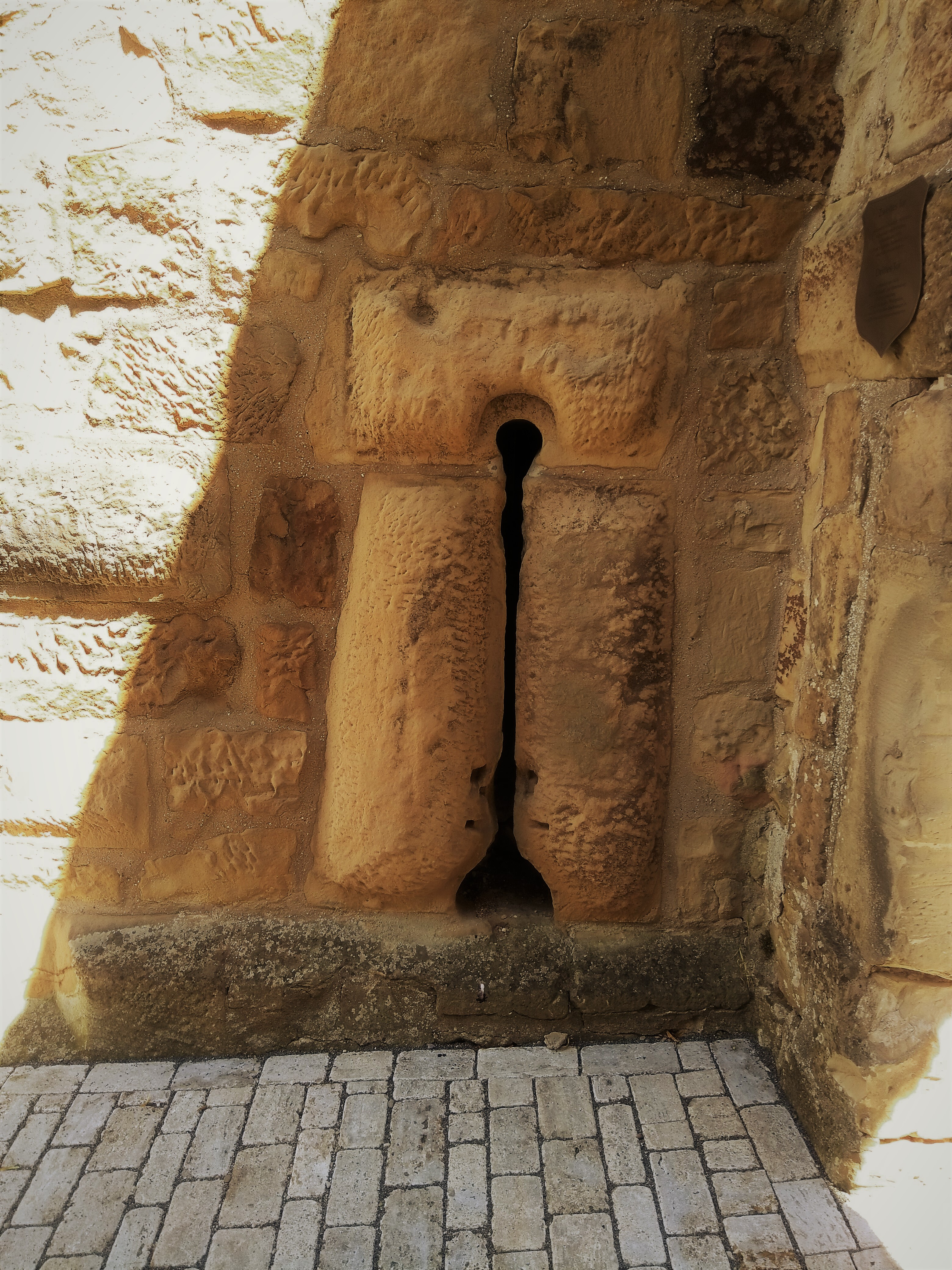 Eeslinnuse keskmise väravatorni lukuaugukujulised laskeavad, mis olid suunatud värava ees seisvale võõrale. Väravatorni lõunakülg.